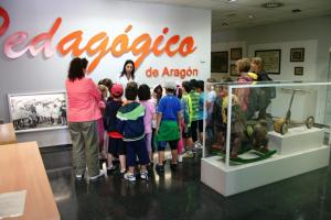 Escolares visitan el Museo Pedagógico de Aragón